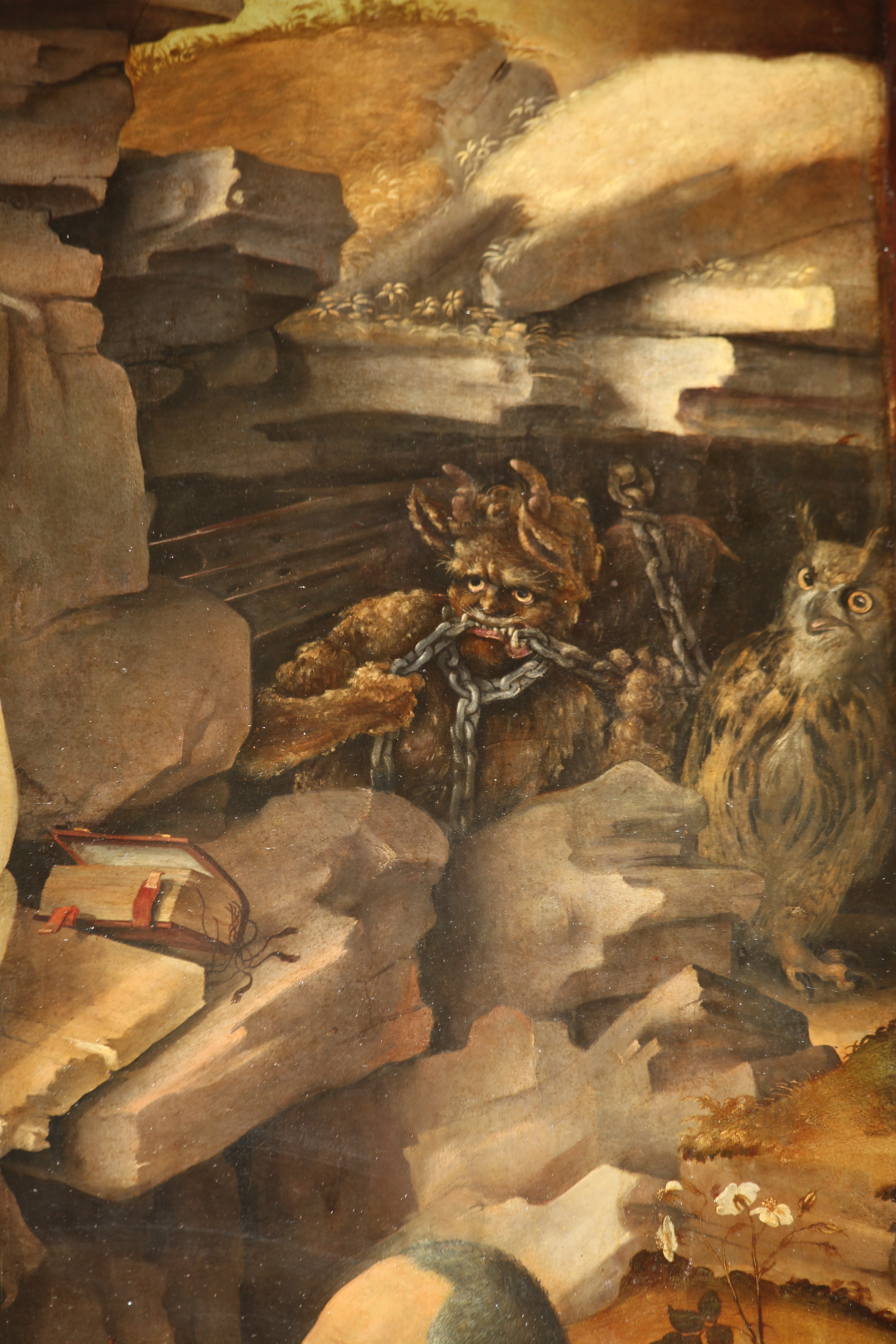 Diavolo, Apparizione della Vergine a San Bernardo di Filippino Lippi, Badia Fiorentina